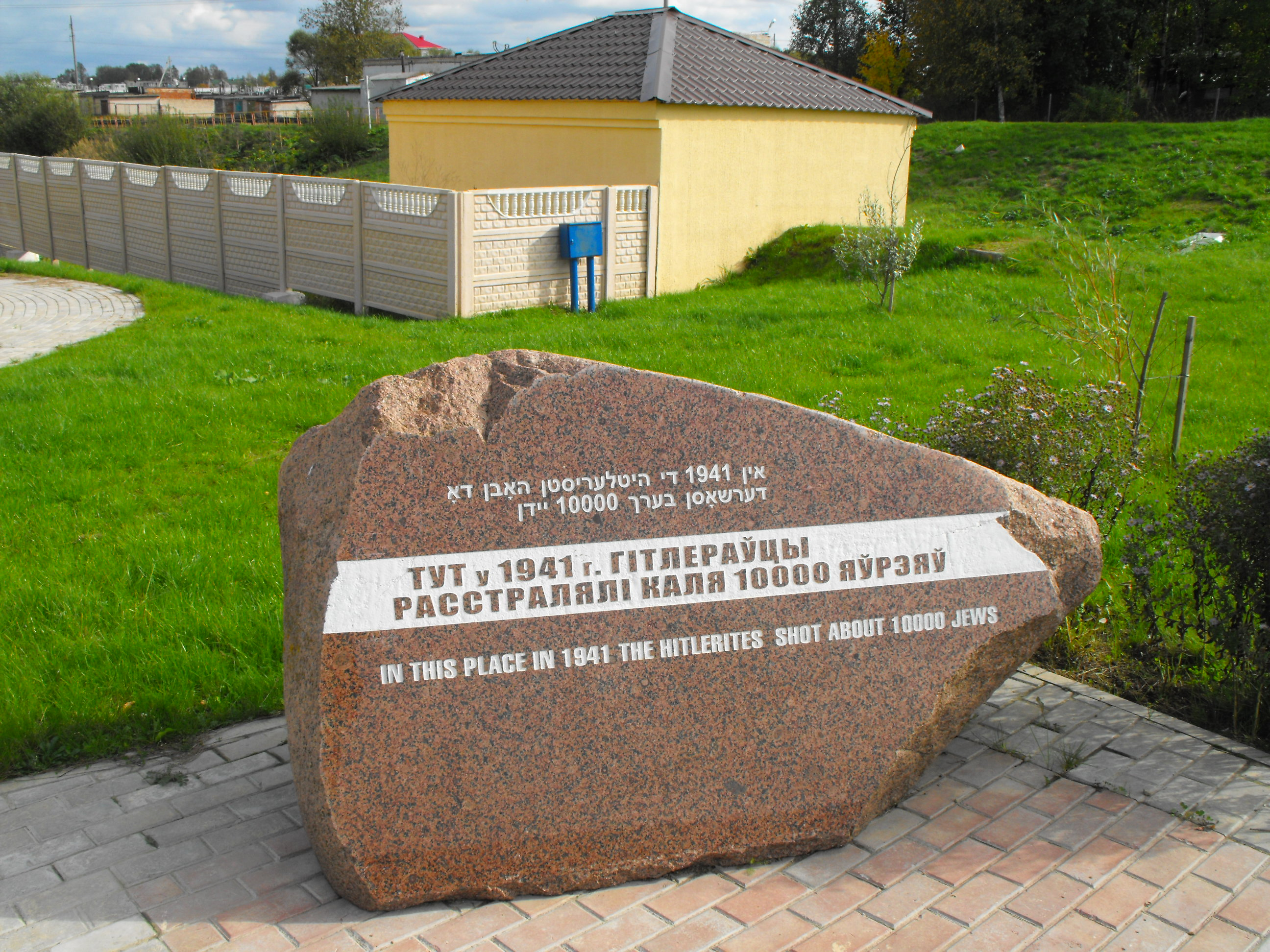 Мемориальный комплекс на месте убийства нацистами около 10000 витебских еврее - узников гетто около бывшей пригородной деревни Себяхи в Иловском (Туловском) рву. Находится слева от дороги на выезде из Витебска с улицы Лазо (в сторону деревни Тулово). Установлен 25 июня 2010 года.